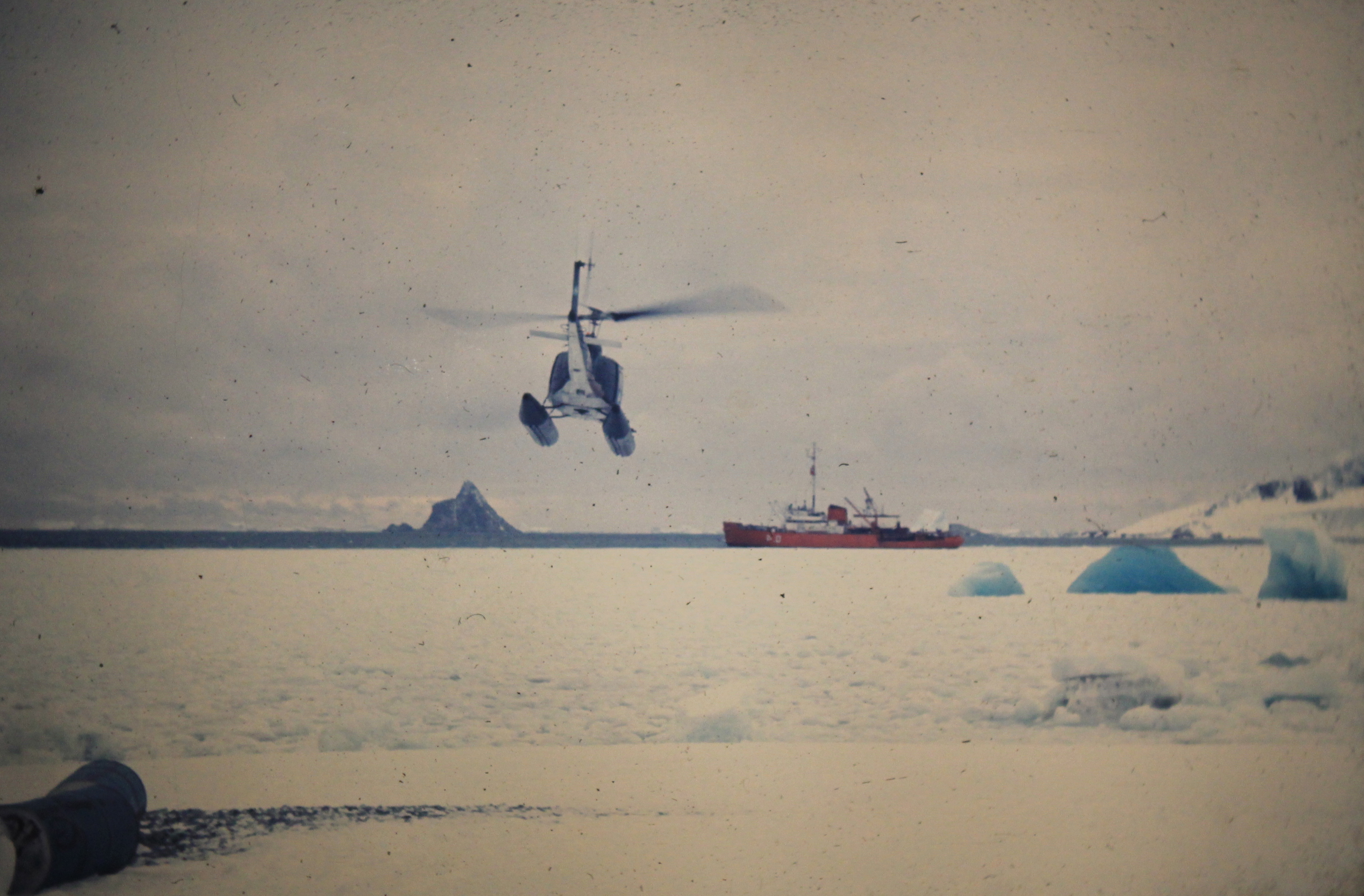 Fotos tomadas por Jorge Giammatteo durante su viaje a la Antártida como meteorólogo, en 1973.